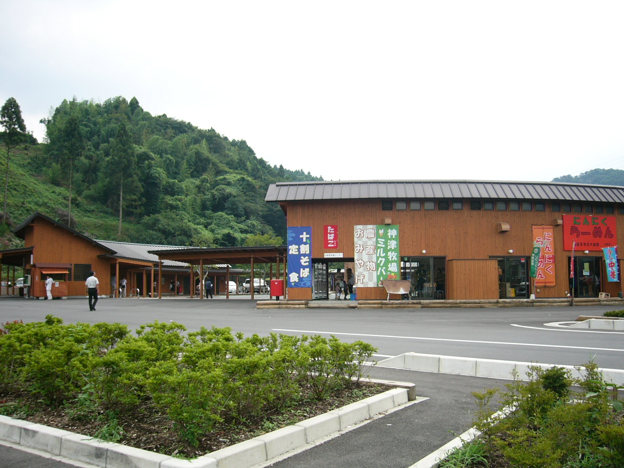 Michinoeki Shimonita (Gunma) (道の駅しもにた)